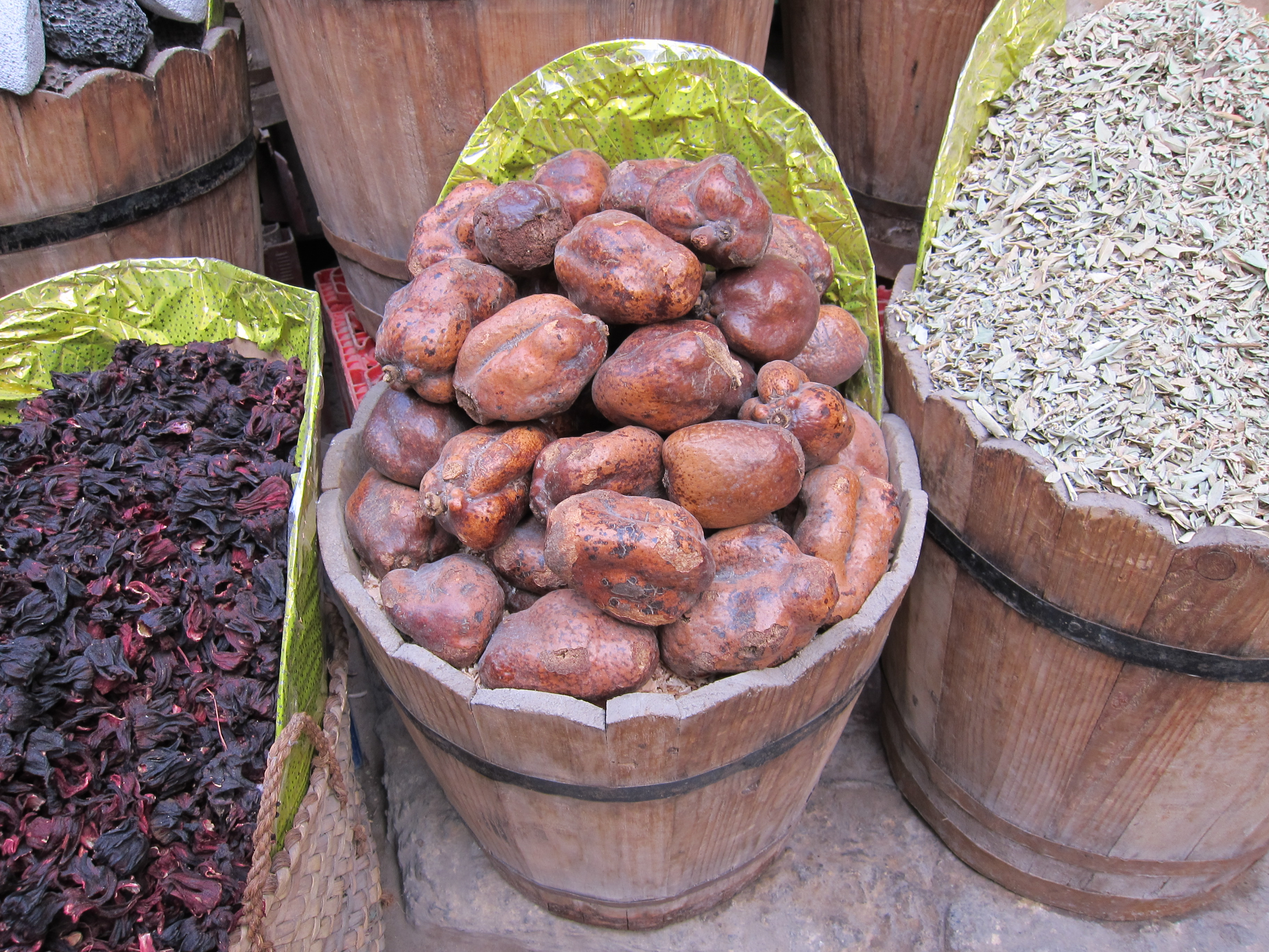 Graine de palmier Hyphaene